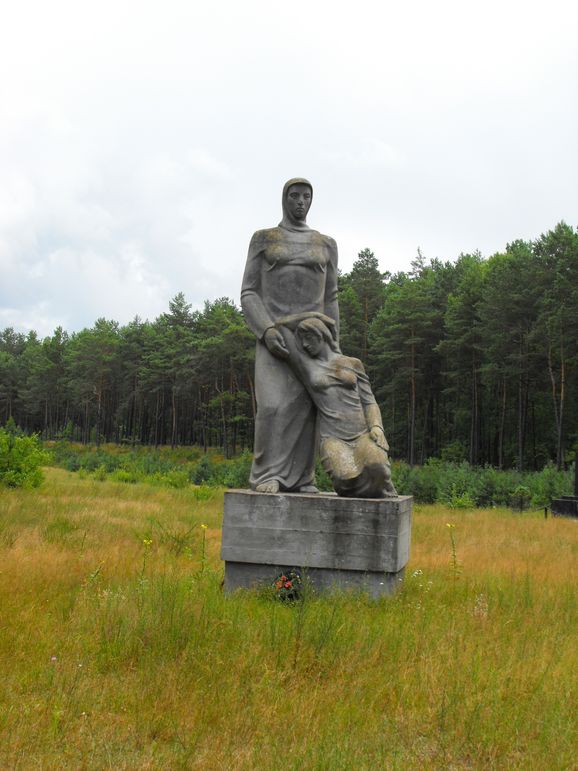 Памятники на месте массовых убийств 12 500 человек - среди них 8 000 евреев Столинского гетто, города Столина и близлежащих деревень, убитых в сентябре 1942 года. Находятся в урочище Стасино (Долин) в 5 километрах севернее Столина. В октябре 1993 года по заказу Киевской еврейской общины был открыт мемориал, один из монументов которого выполнен в виде раскрытой книги. Второй памятник по заказу Столинского горисполкома выполнен в виде женщины с ребенком. На этом месте в Стасино накануне Второй мировой войны началось строительство аэродрома - успели вырубить лес и выкопать котлован для подземных ангаров. Эти незавершенные котлованы и были использованы нацистами и полицаями как расстрельные ямы.